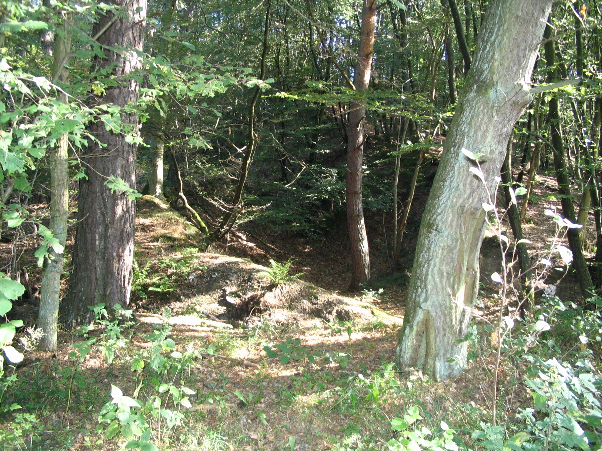 verschütteter Stolleneingang Grube Eid